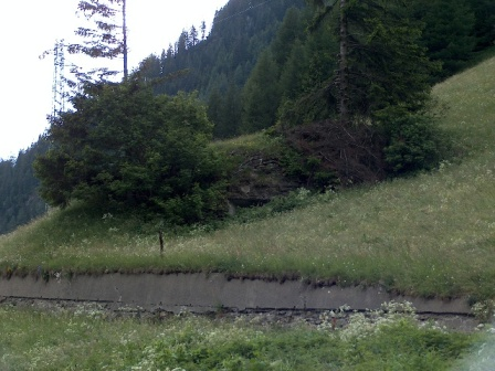 Opera 2, sbarramento Bagni del Brennero